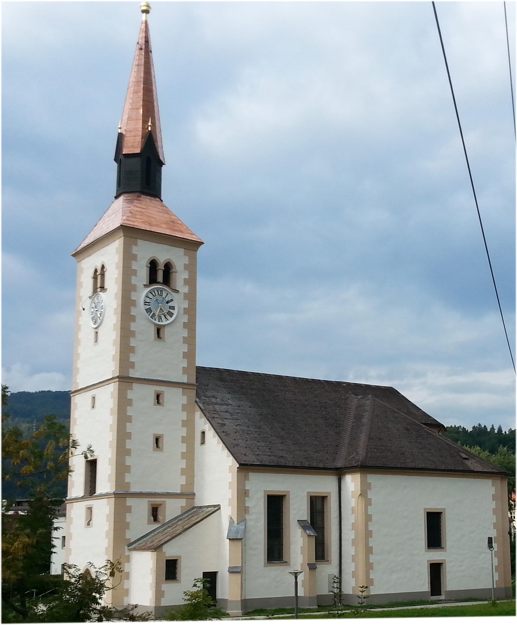 Kath. Pfarrkirche hl. Oswald und Kirchhof in Kapfenberg/Österreich, Ansicht aus Süd (saniert 2018).